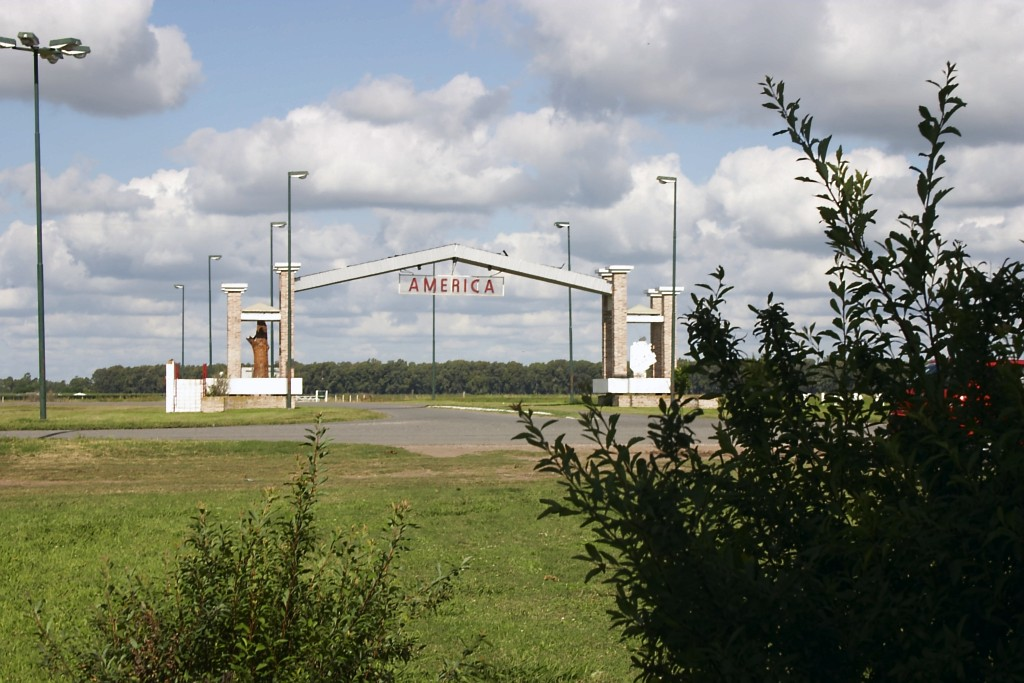 Arco de entrada de América, Rivadavia, Buenos Aires, Argentina